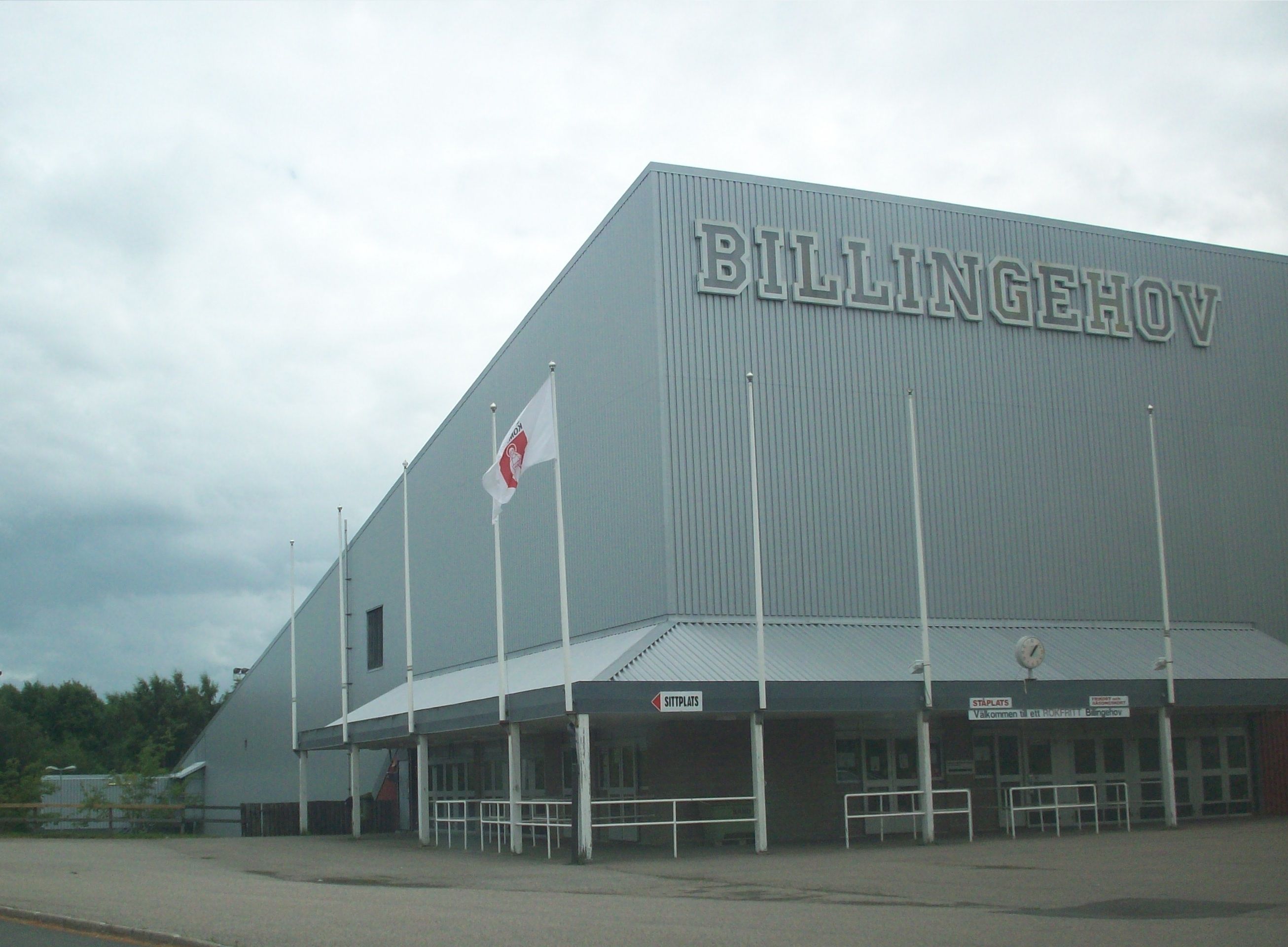 Ishallen Billingehov i Skövde